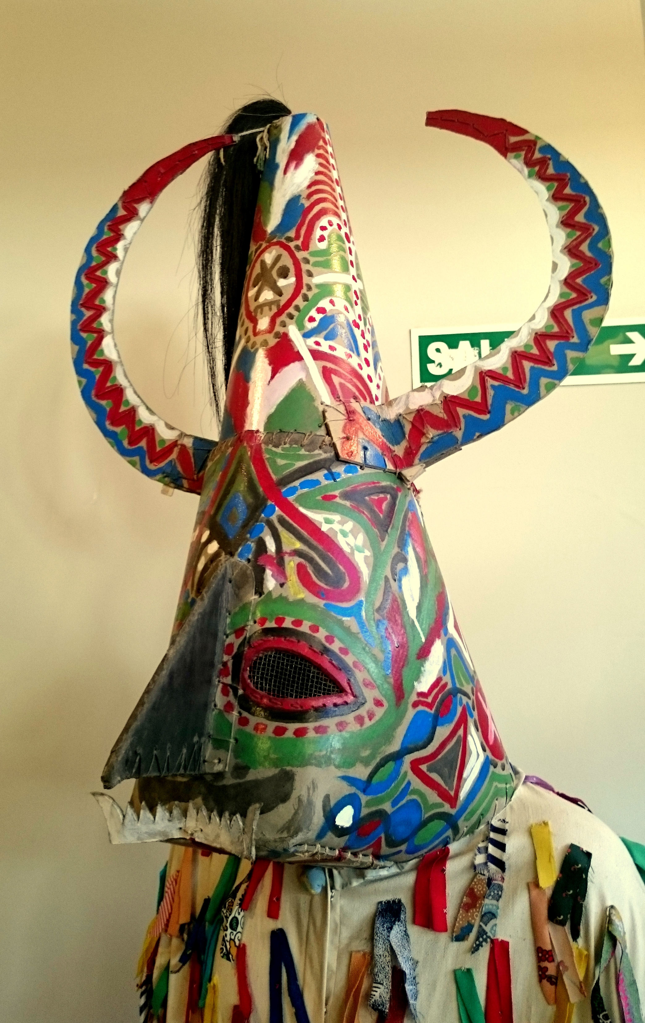 Traje de Jarramplas (Piornal, Cáceres) en el Museo de Artes y Tradiciones Populares de Madrid This is a photography of a Folklore festival in Spain (Wikidata id Q4896555).